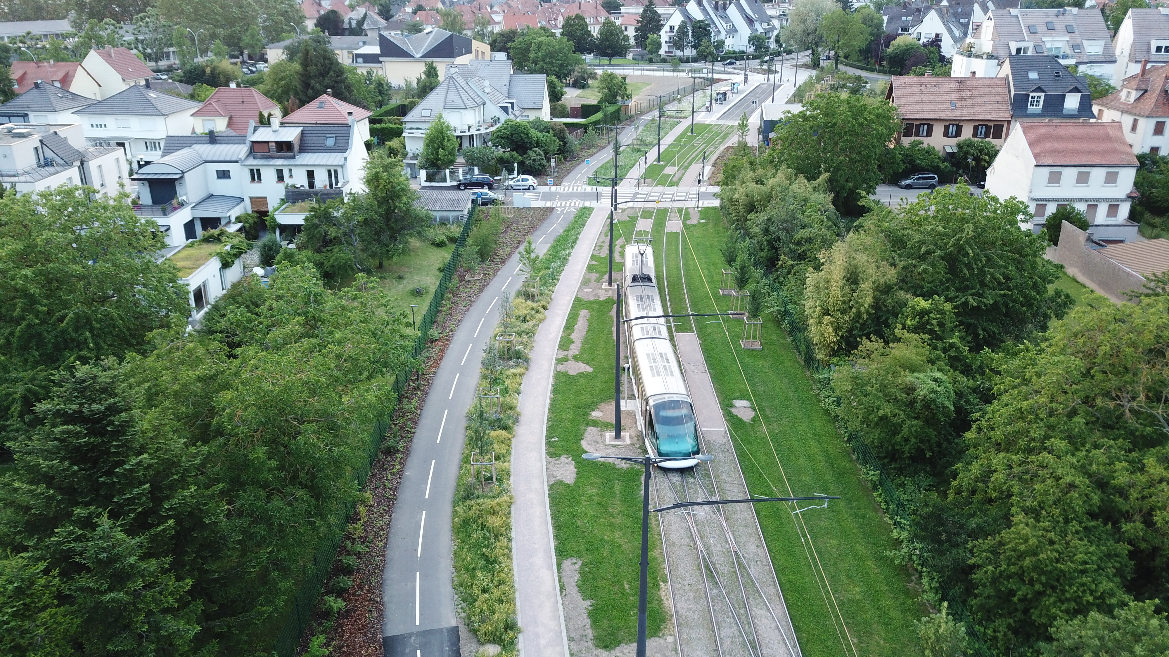 Robertsau tram vue aérienne